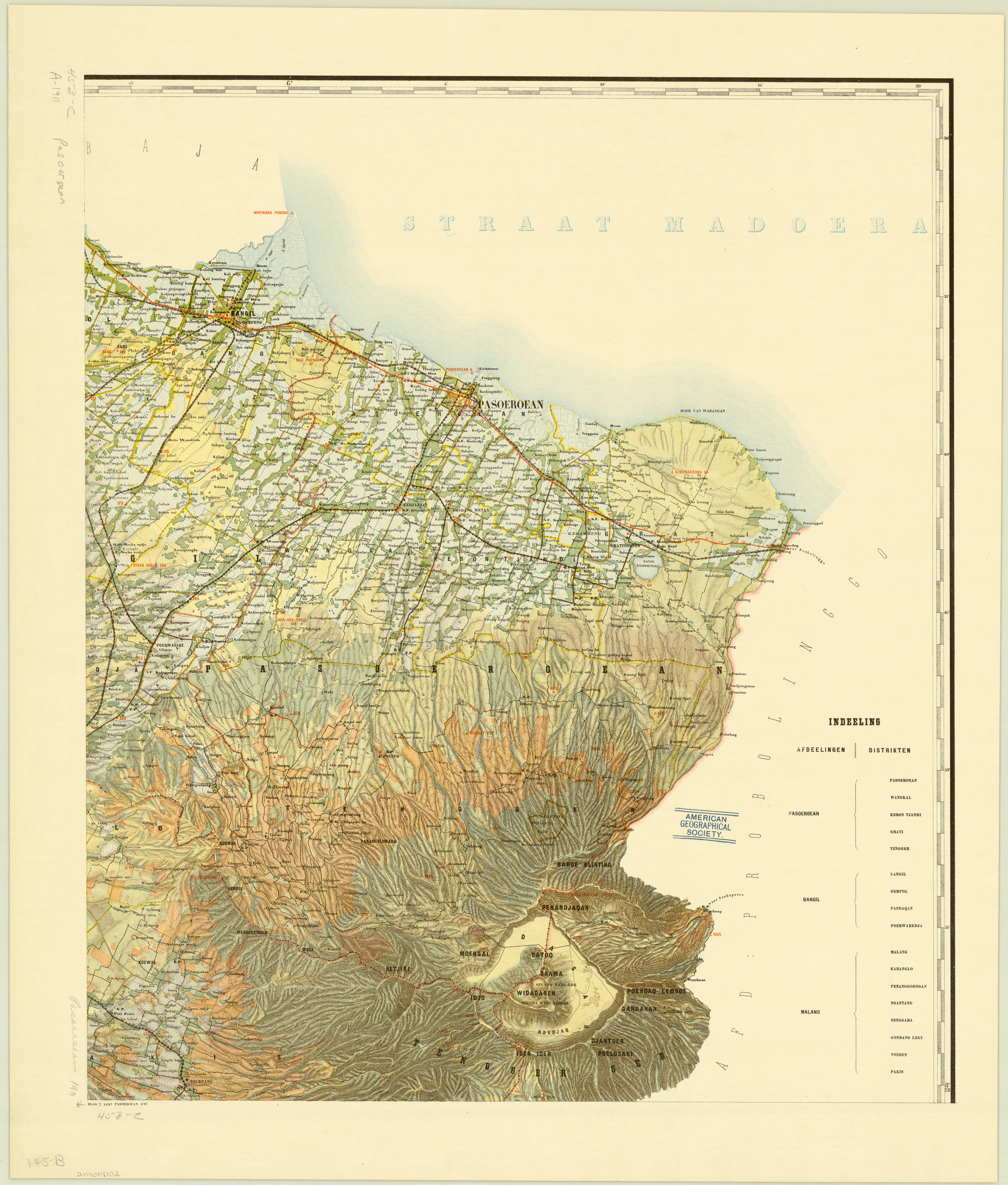 Topographische kaart der afdeelingen Pasoeroean, Bangil en Malang van de residentie Pasoeroean : opgenomen ingevolge Gouvernements Besluit van den 6den Juli no. 8 in de jaren 1874-1880 / in steendruk gebracht op de schaal van 1:100.000 aan de Topographische Inrichting te 's-Gravenhage